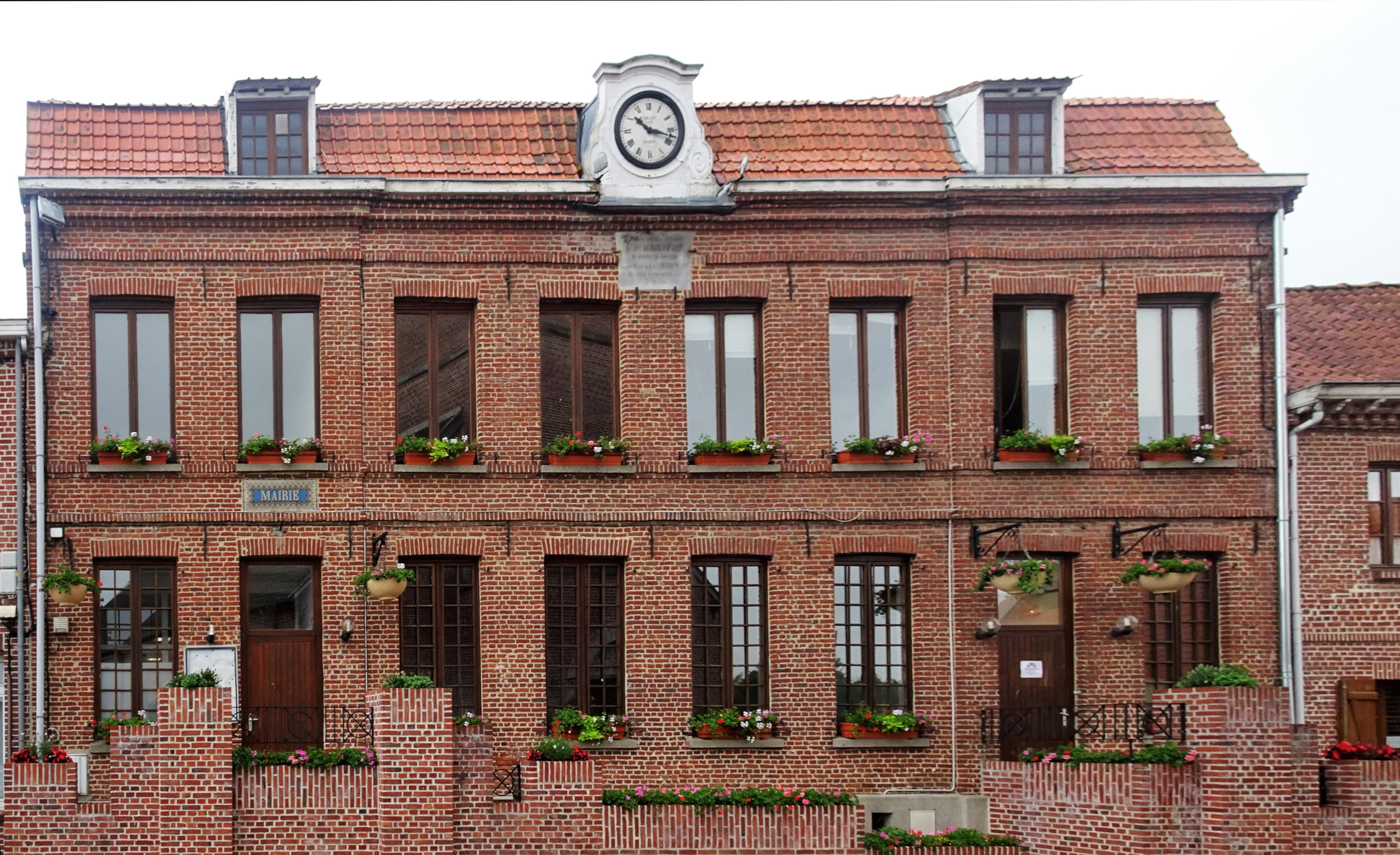 Façade de la mairie de Camphin-en-Pévèle Nord Hauts-de-France.